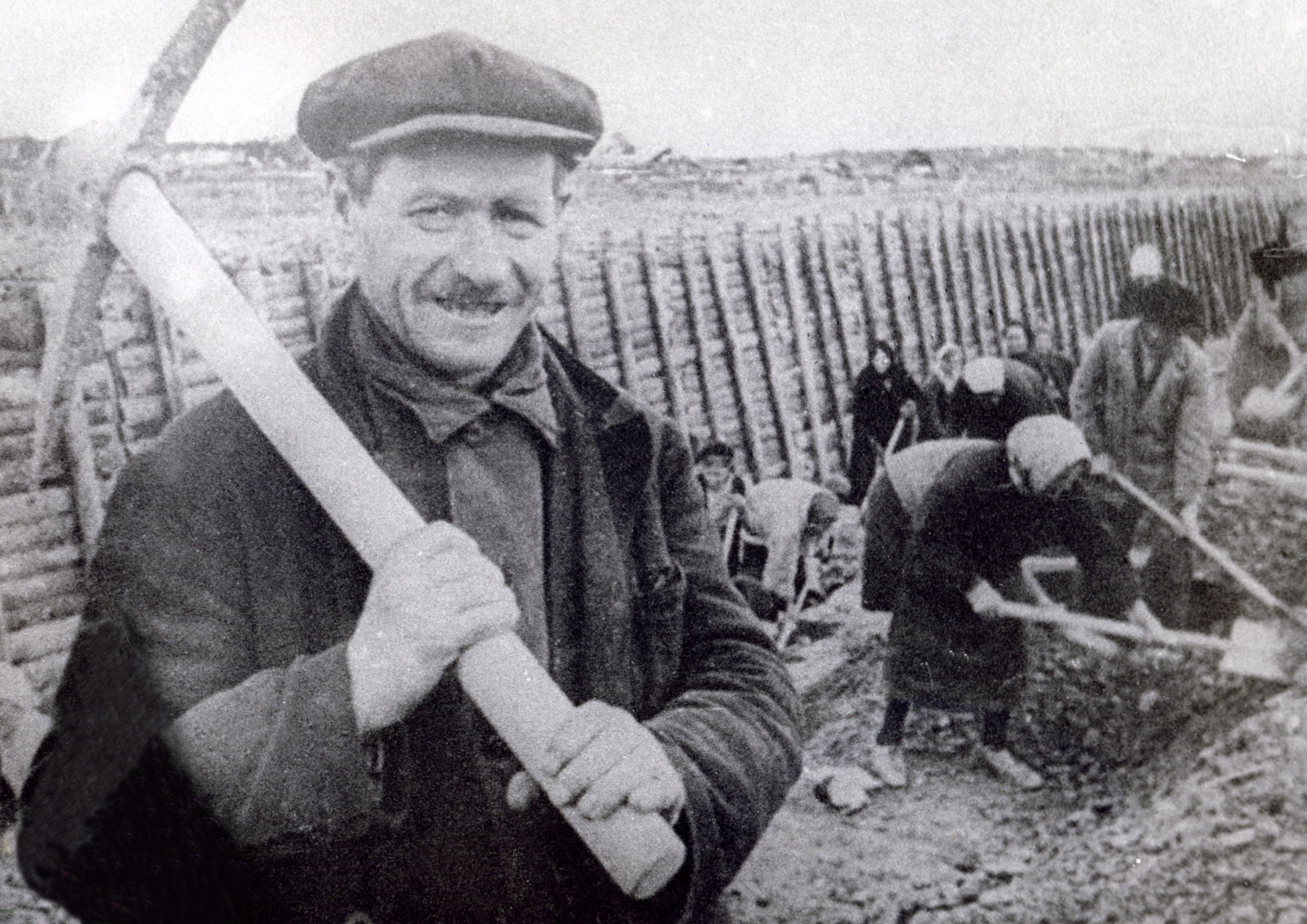 Ленинградцы на строительстве Лужского рубежа, лето 1941 года